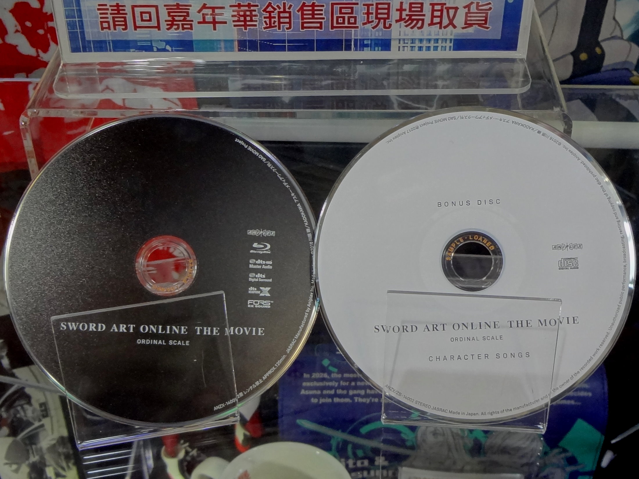 動漫爭艷嘉年華展區《刀劍神域》主題館，《刀劍神域劇場版：序列爭戰》日本版藍光光碟（左）與角色歌CD（右）。